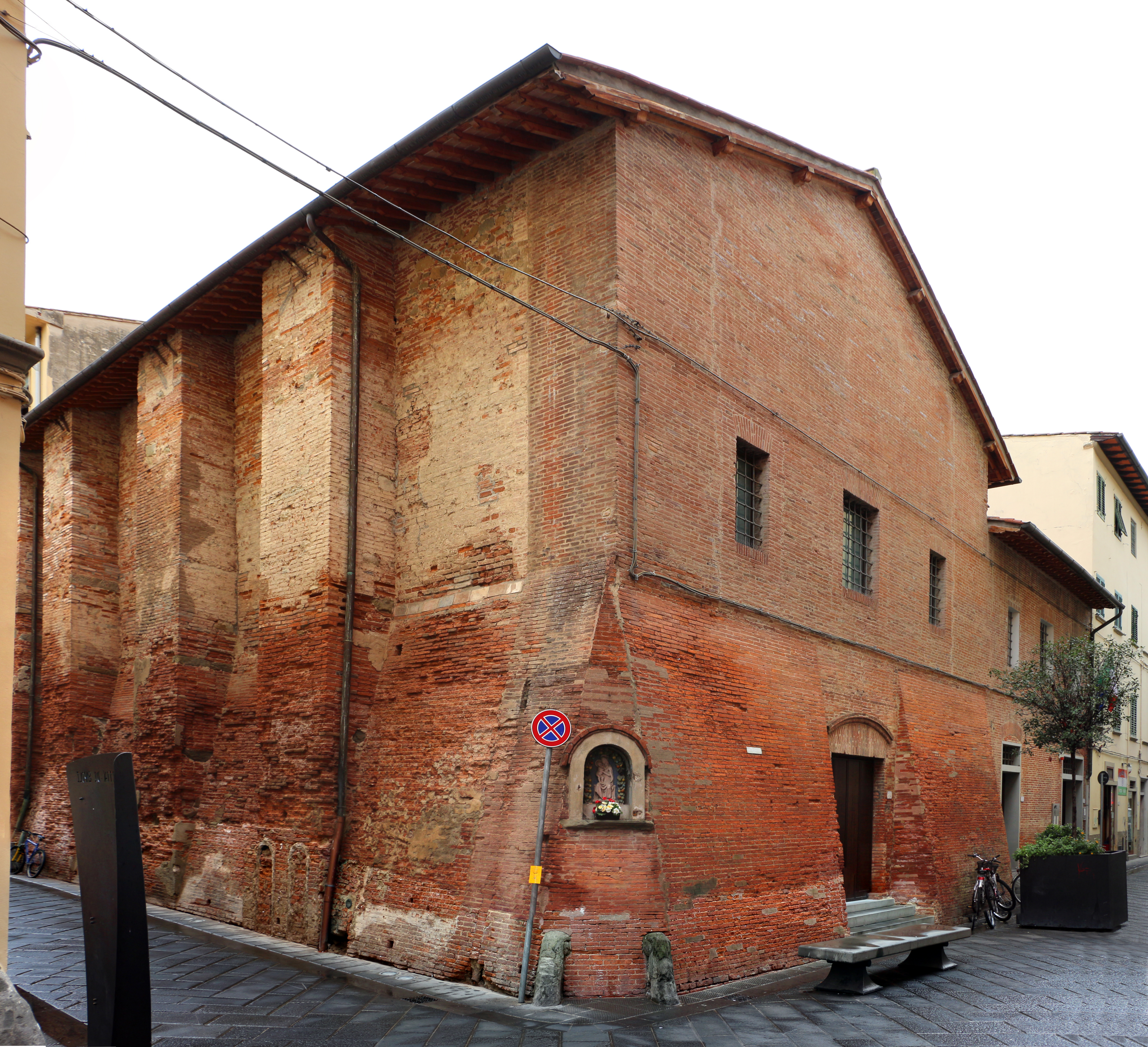 Museo del Vetro di Empoli - ex Magazzino del Sale (esterno) This is a photo of a monument which is part of cultural heritage of Italy.